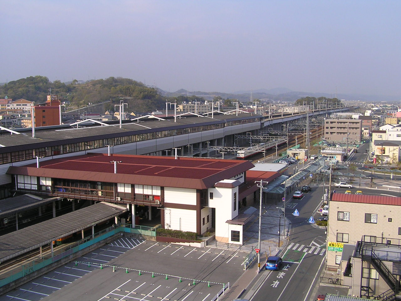 Shin-Kurashiki Station panorama